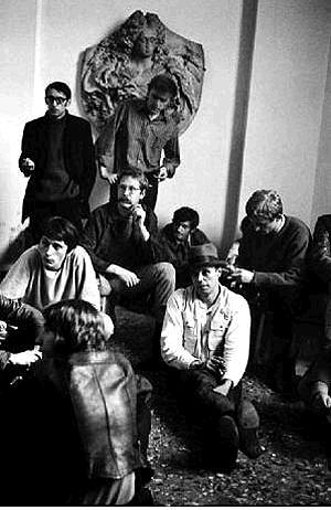 Joseph Beuys im Foyer der Kunstakademie während eines Ringgesprächs mit Studenten am 6.5.1969, einen Tag vor Schließung der Kunstakademie am 7.5.1969; aus der Serie Künstlerbilder Düsseldorf